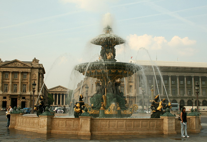 Fontaine de la place de la Concorde